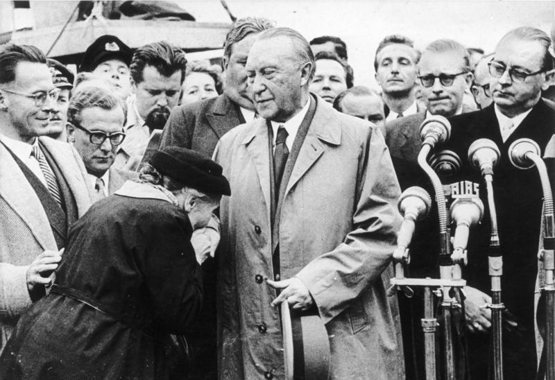 Die Mutter eines Kriegsgefangenen dankt Bundeskanzler Dr. Konrad Adenauer nach seiner Rückkehr aus Moskau am 14. 9. 1955 auf dem Flughafen Köln/Bonn für den erfolgreichen Abschluß seiner Verhandlungen mit der sowjetischen Führung. Dr. Adenauer hatte erreicht, daß bis Ende 1955 über 15.000 Kriegsgefangene, Internierte und Zivilverschleppte in die Bundesrepublik Deutschland entlassen wurden.